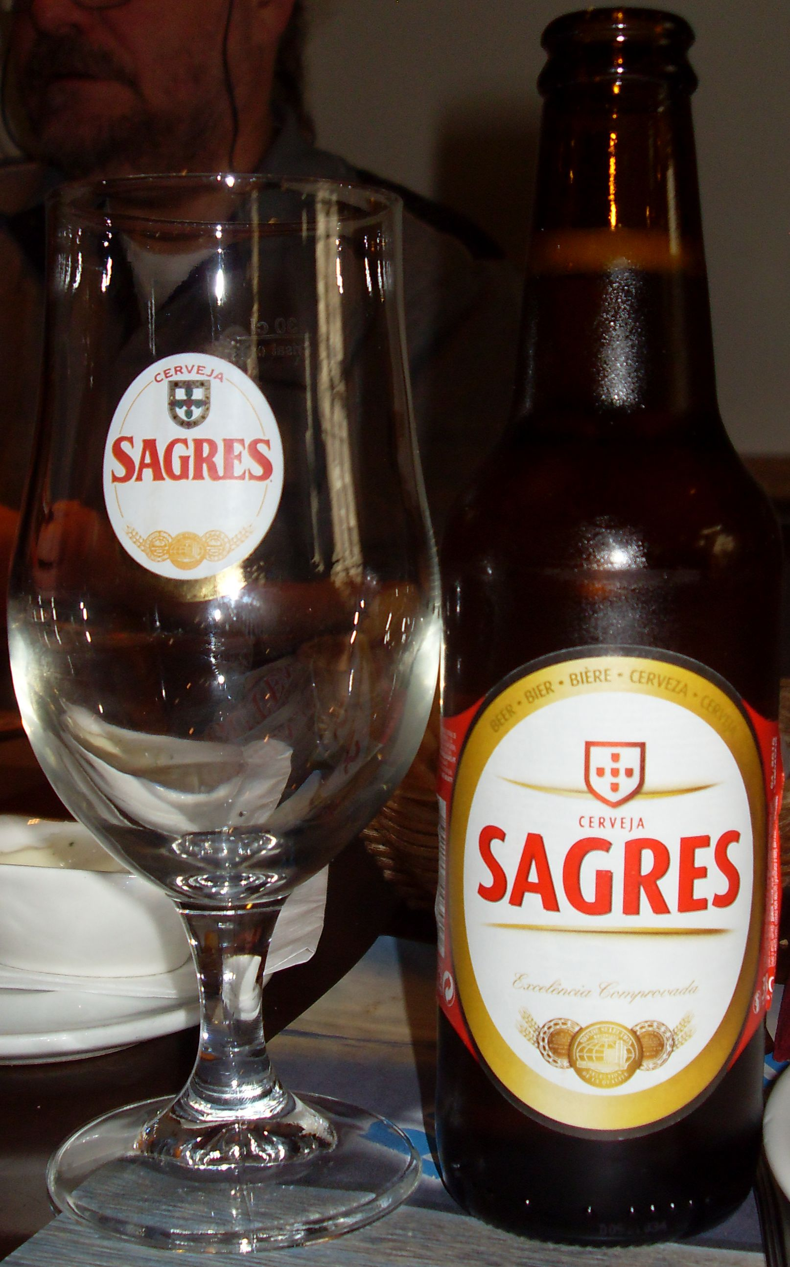 Sagres Pils.